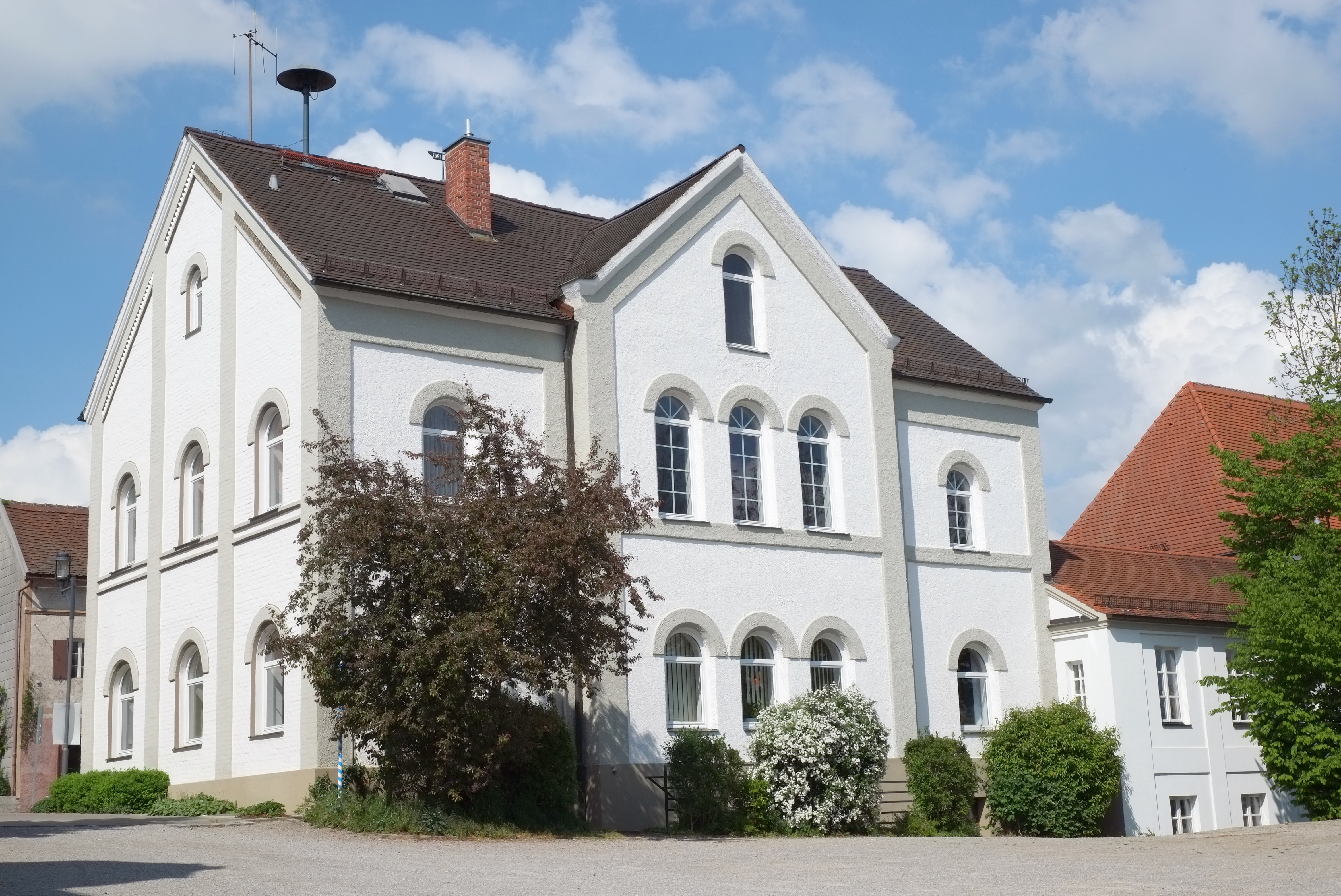 Rathaus in Dinkelscherben im Landkreis Augsburg (Bayern, Deutschland)